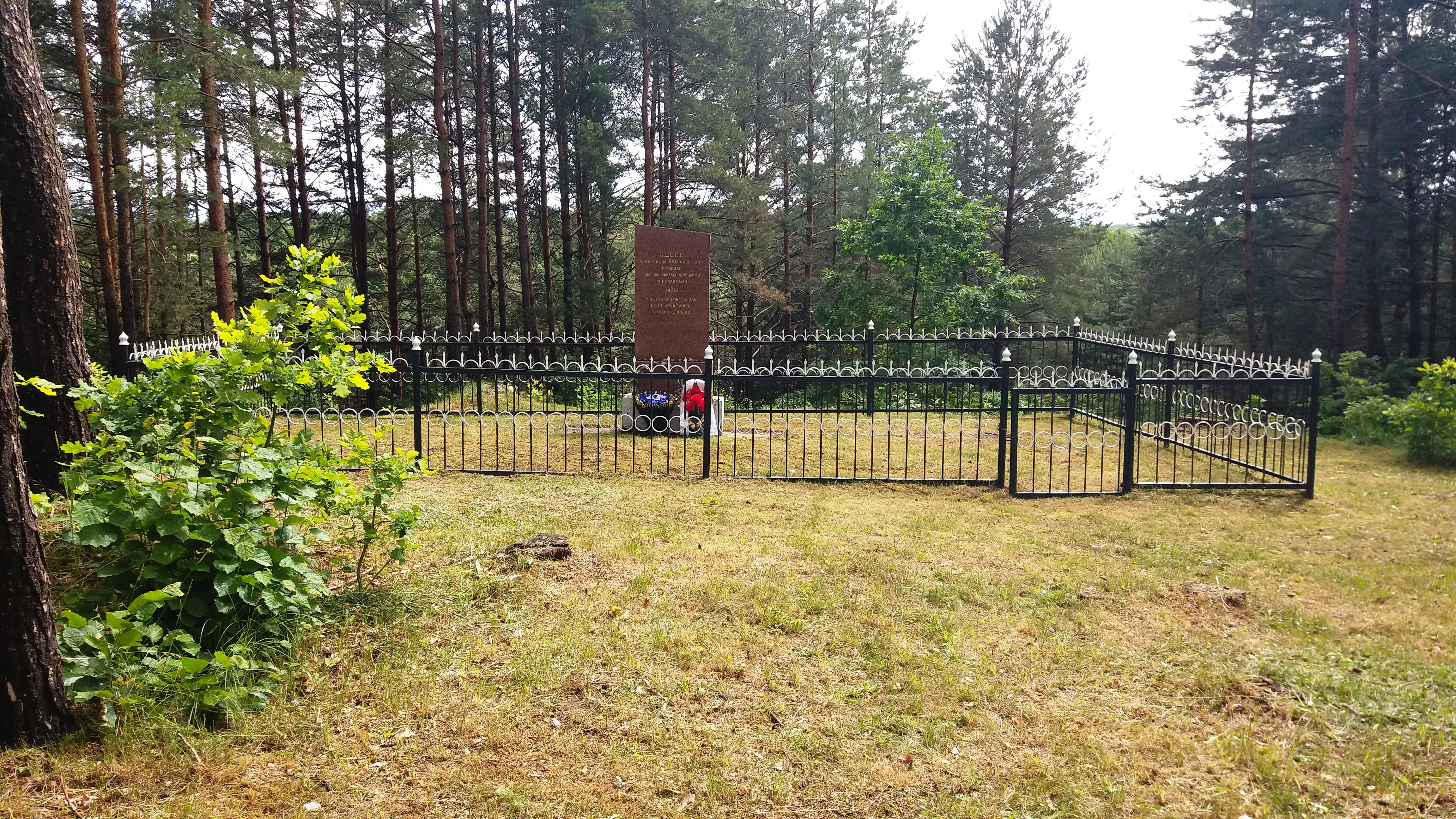 Памятник на месте убийства 5 мая 1942 года нацистами 440 евреев деревни Обчуга Крупского района. Находится примерно в 500 метрах к северо-востоку от центра деревни. Сама братская могила с останками убитых находится справа от памятника в низине. Первоначальный памятник был установлен на этом месте в 1960 году.